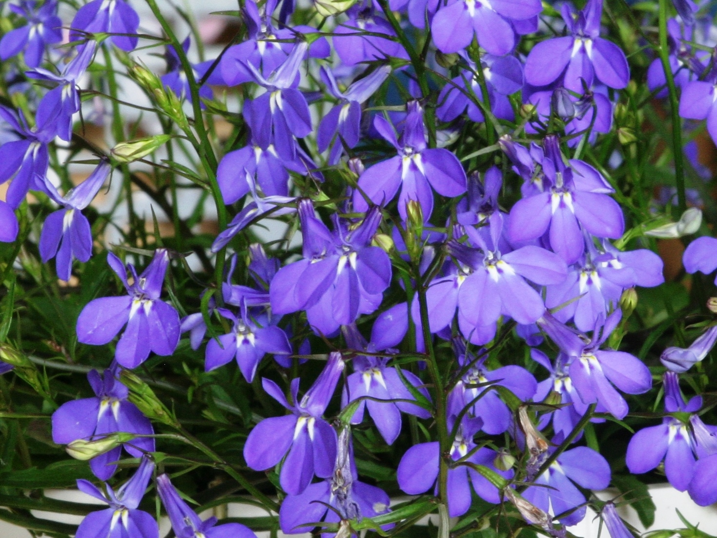 Lobelia erinus Sapphire.